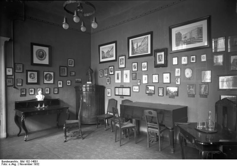 Das Berliner Lessing-Museum muss seine Pforten schliessen weil die Miete nicht bezahlt werden kann ! Blick in das Lessing-Museum in Berlin mit alten Stichen und Ueberlieferungen.